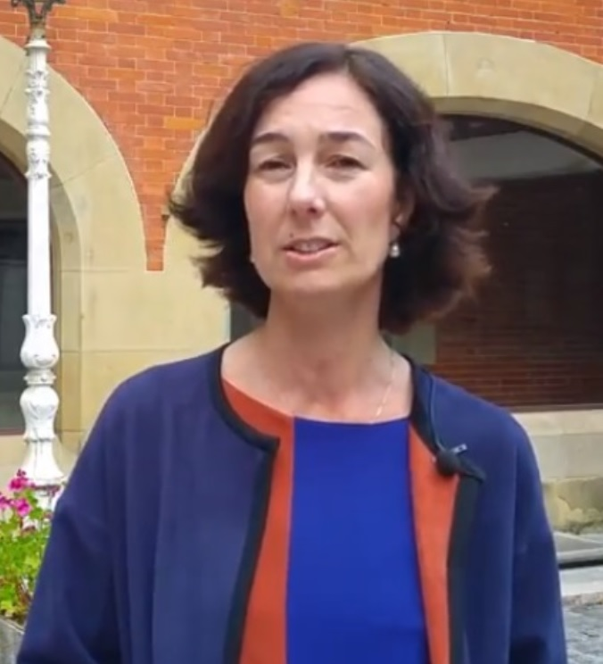 Idoia Otaegi